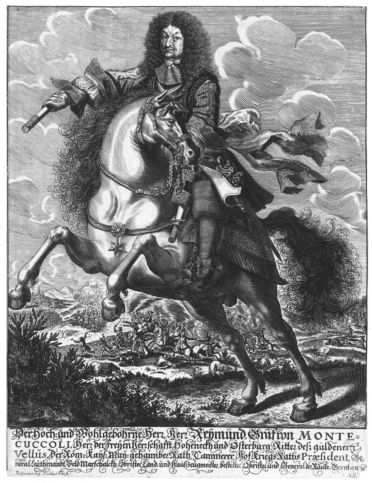 Verleger: Fürst, Paul Datierung: um 1646 / 1660